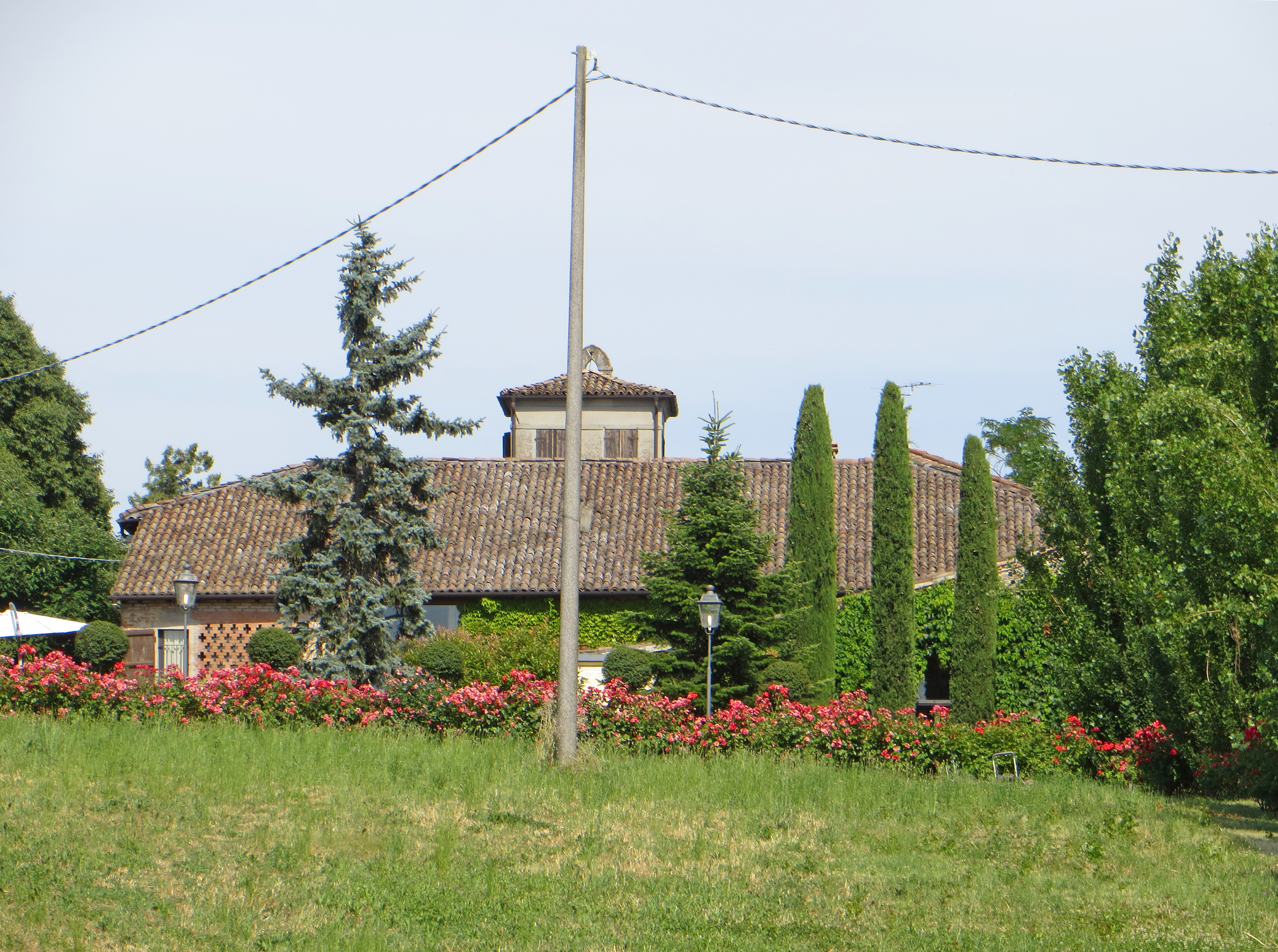 Villa Lalatta Costerbosa (Montechiarugolo) - lato ovest